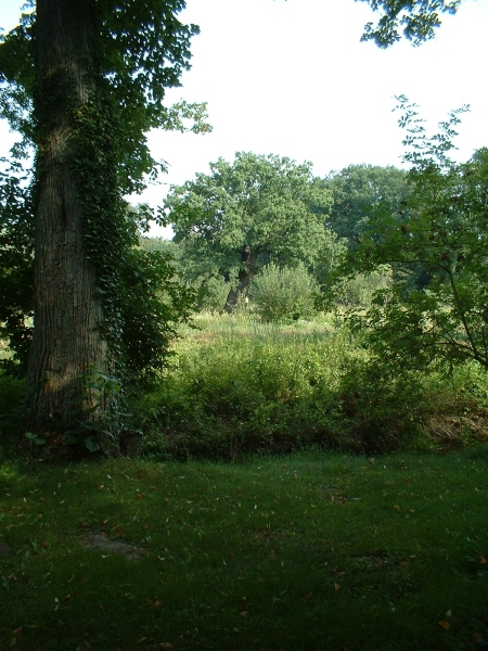 sogenannte Fouqué-Eiche am Rande des Schlossparkes von Nennhausen